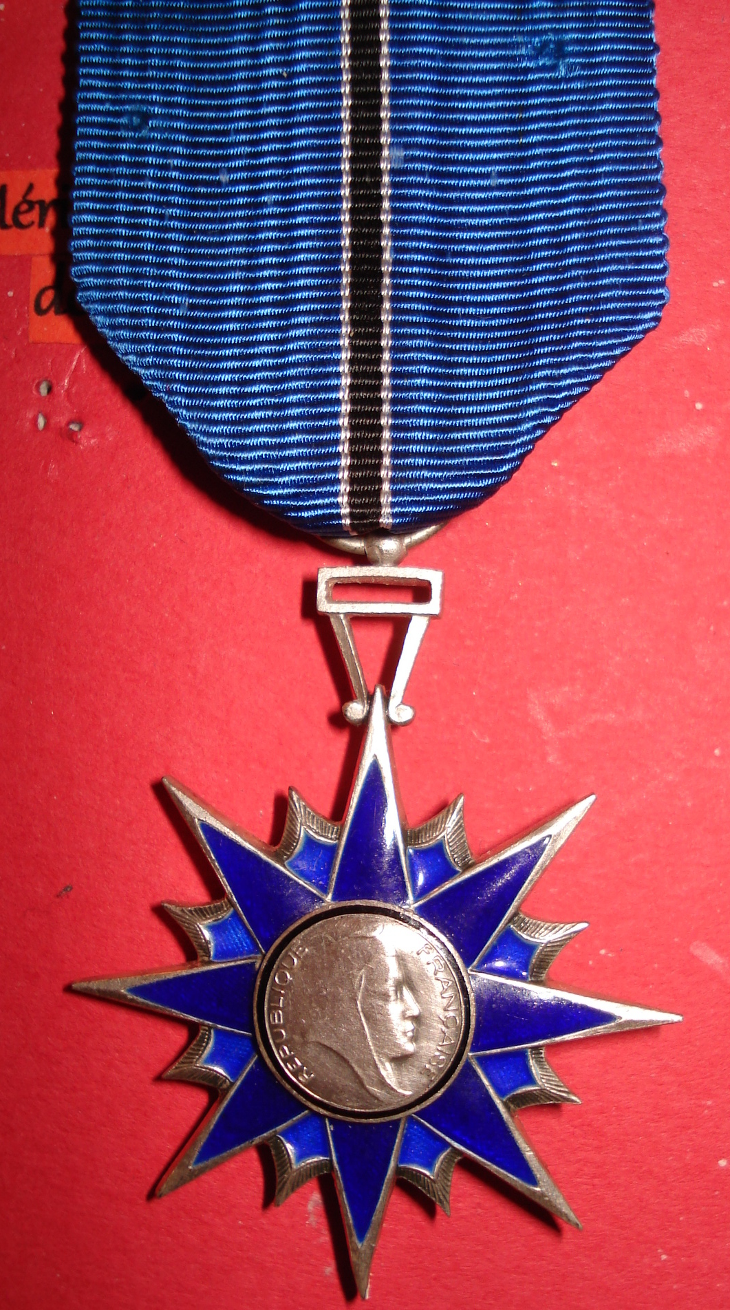 Etoile métallique double face à huit pointes principales, séparées par huit pointes plus petites. L'intérieur est revêtu d'émail bleu. Le médailloin central porte la tête de la République couverte du bonnet phrygien et la lkégende : REPUBLIQUE FRANCAISE. Au revers, MERITE CIVIL. Le ruban est bleu marine avec une raie centrale blanche et au centre un filet noir.